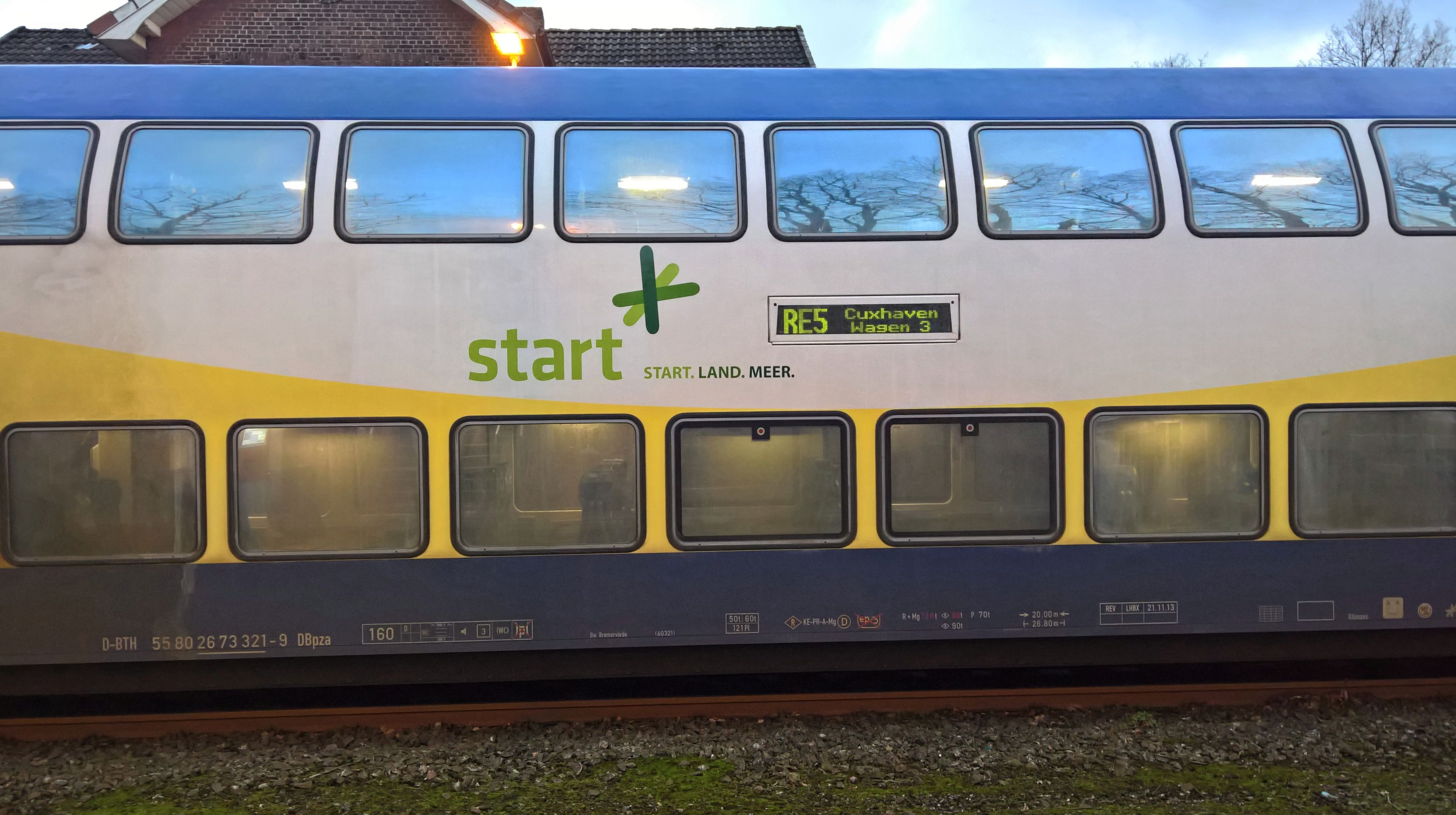 Regionalverkehre Start Deutschland auf der Niederelbbahn